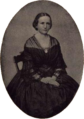 Camilla Collett, født Wergeland (1813–1895). Fotografi fra 1860.